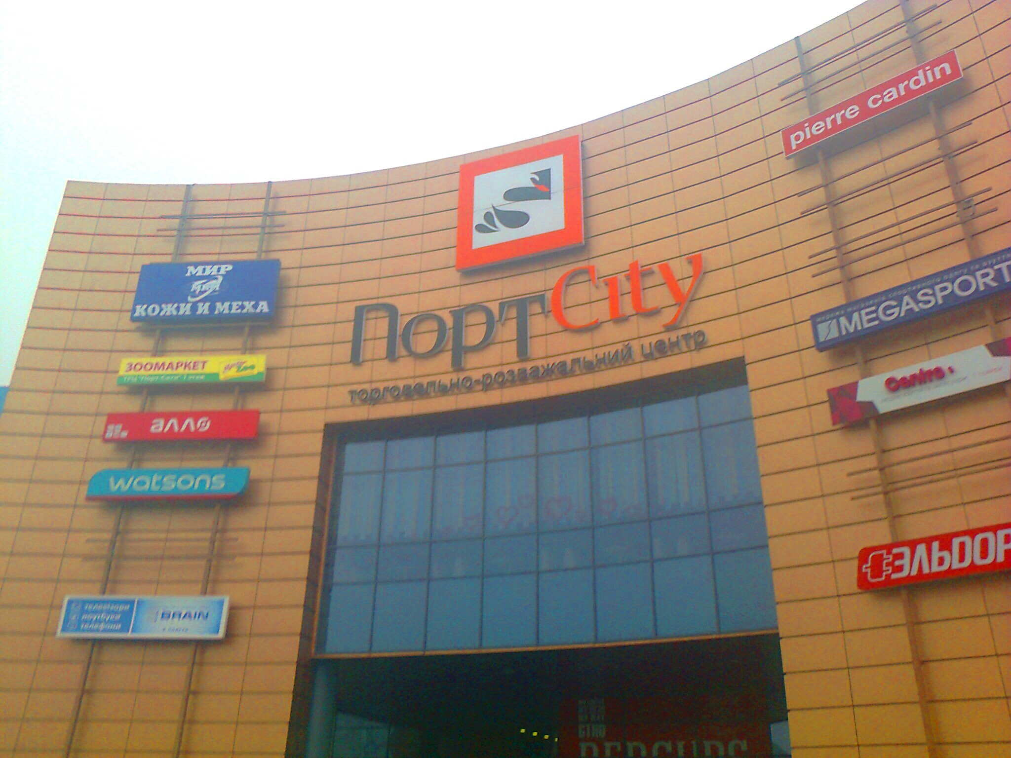 ТРЦ ПортСити в Мариуполе